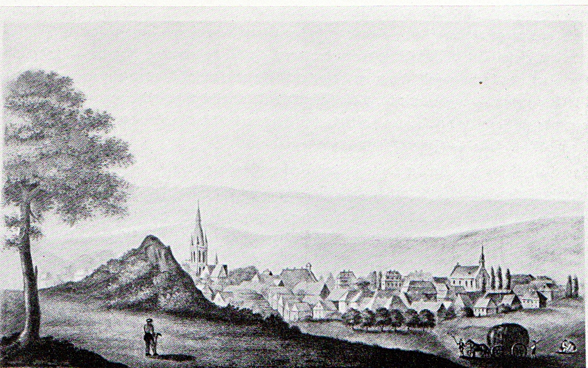 Stadtansicht von Brilon nach einer Lithographie von 1780